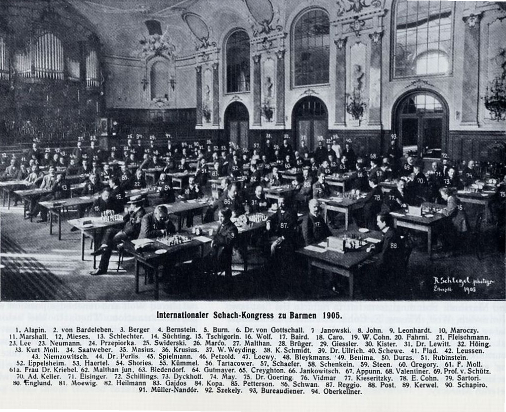 Der Internationale Schachkongress 1905 in der Concordia